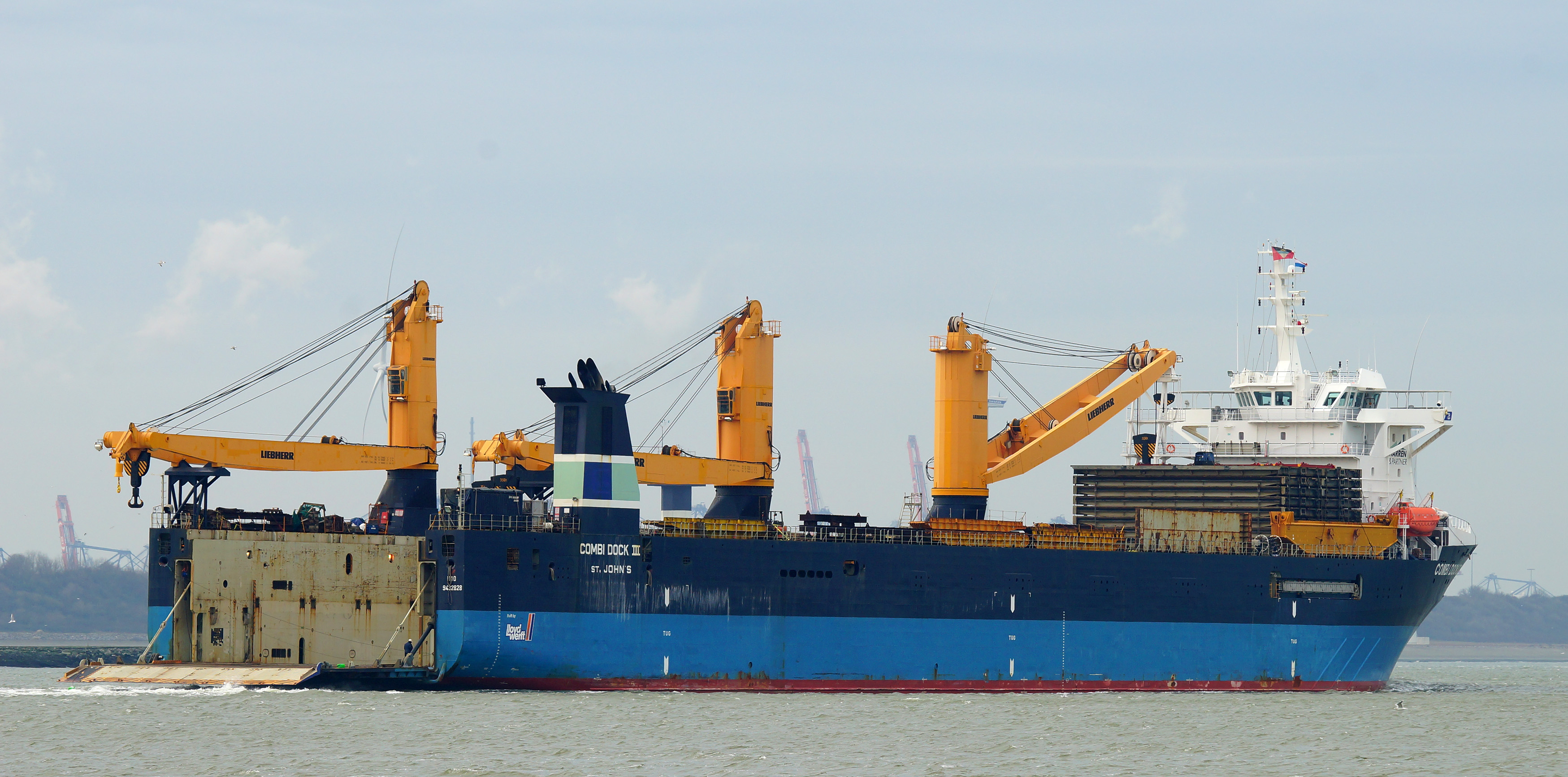 Nieuwe Waterweg 21-1-2016. COMBI DOCK III verhaalde van Rotterdam naar de Brittanniëhaven.